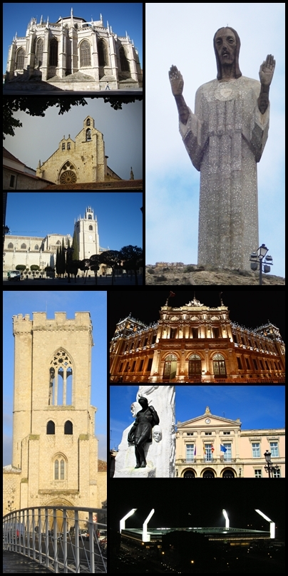 Montaje de fotografías de Palencia